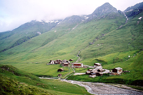 Juf (Avers) - Höchstgelegener ganzjährig besiedelter Ort